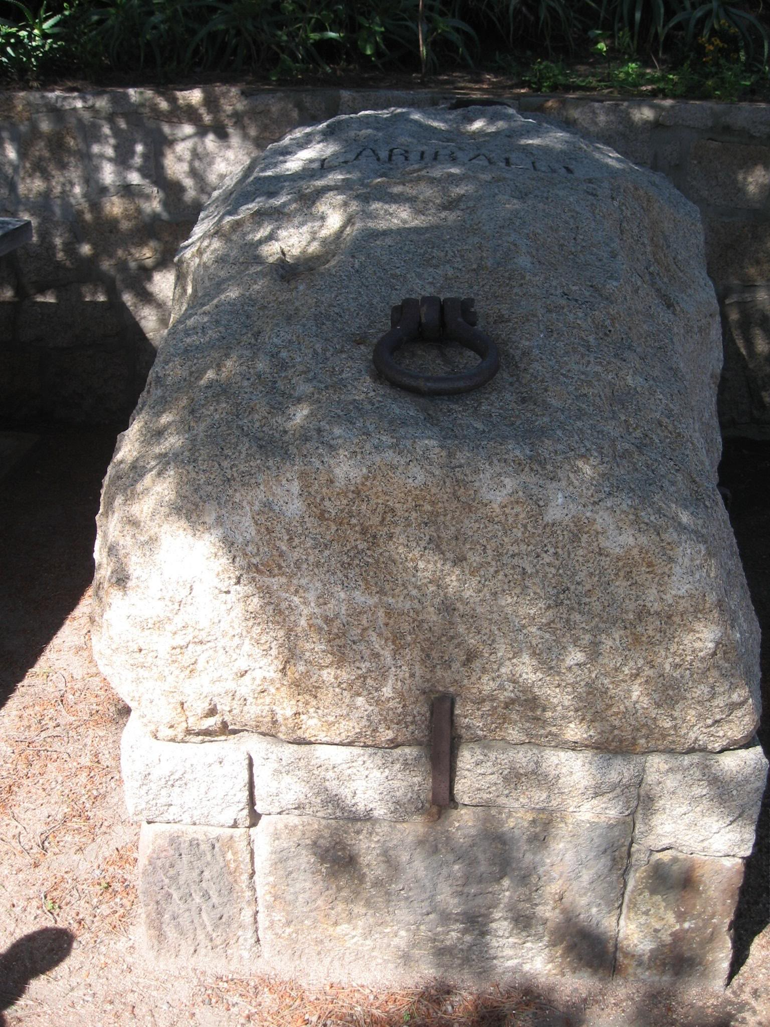 קברו של גריבלדי